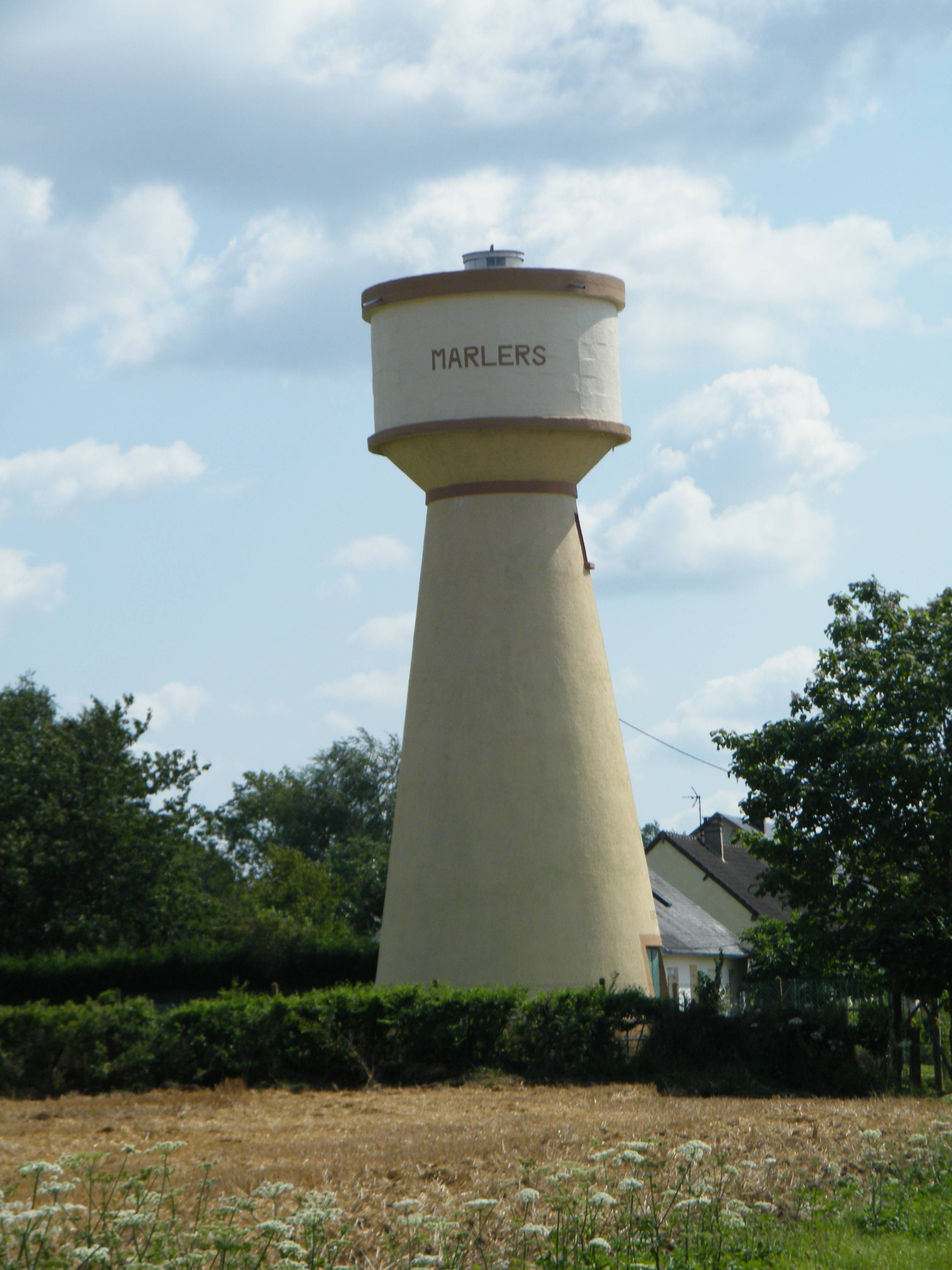 Entrée de village emblématique.